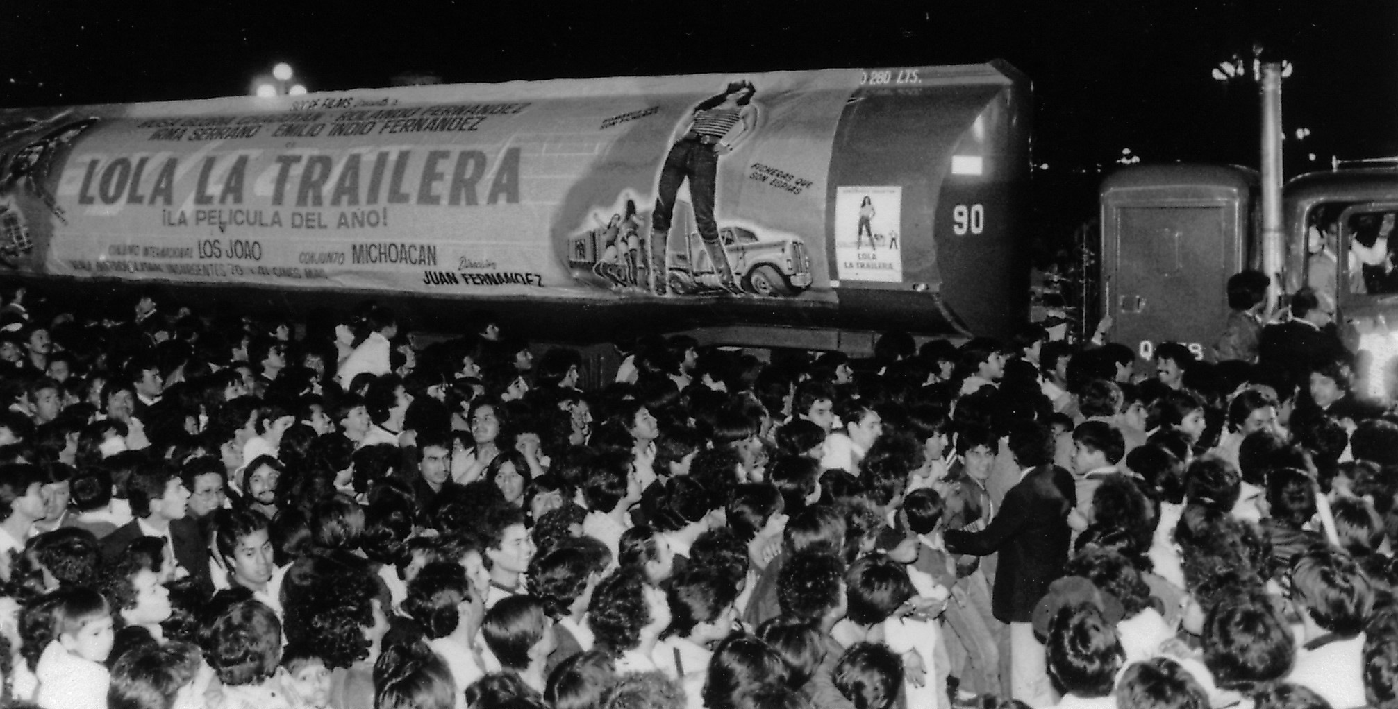 Premier Lola La Trailera